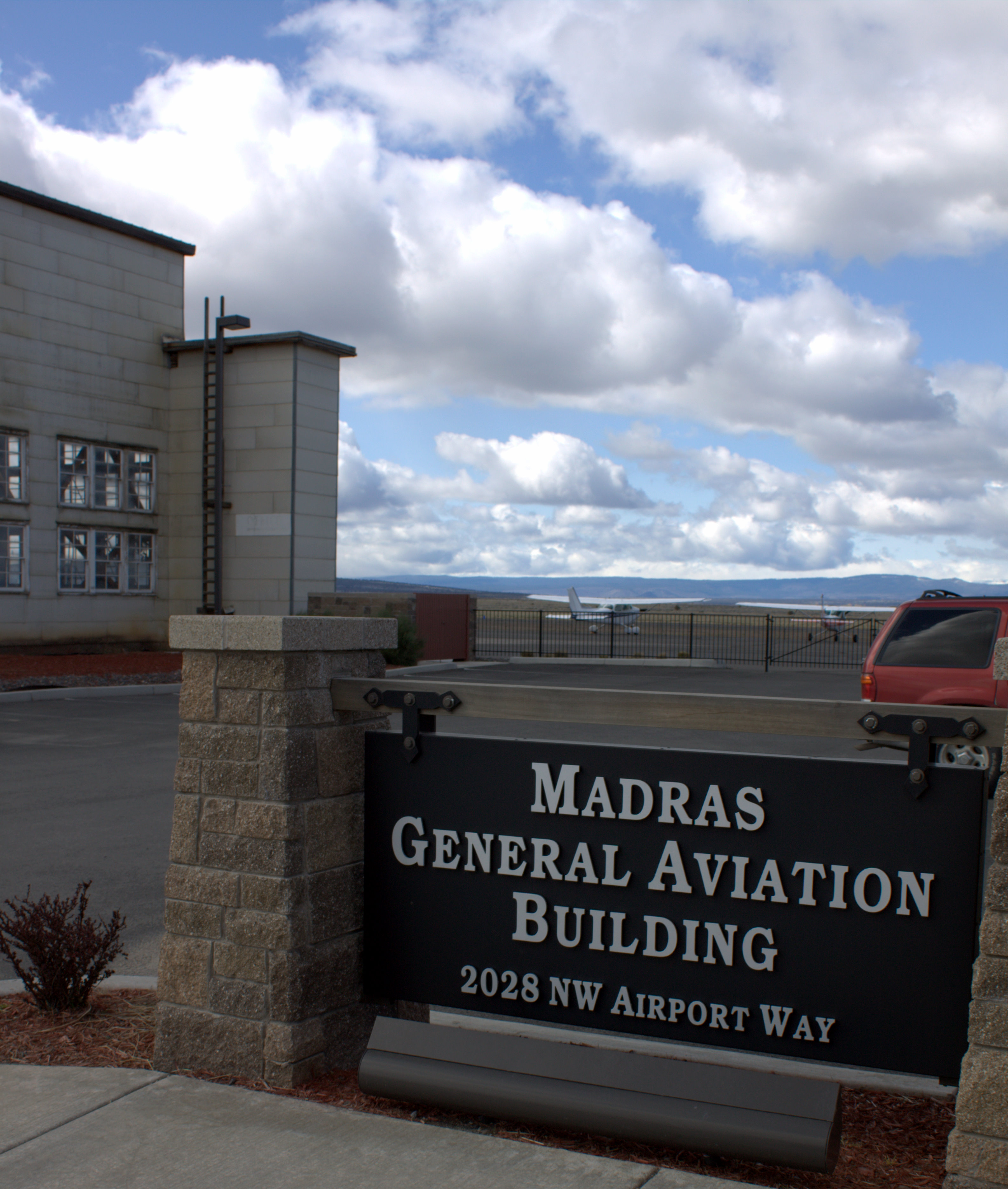 Airport entrance marker, Madras Municipal Airport, Madras, Oregon